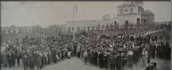 Grito de Alcorta (1912, prov. de Santa Fe, Argentina).